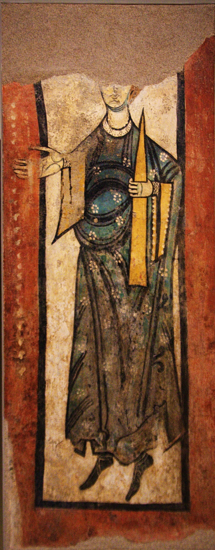 Única resta conservada de la decoració de l'església, en ruïnes. Era situada a l'embocadura de l'absis, vora la finestra lateral. Procedeix de l'antiga església de Sant Pere d'Esterri d'Àneu, també anomenada Sant Pere Vell o de Can Carrera (Esterri d'Àneu, Pallars Sobirà).